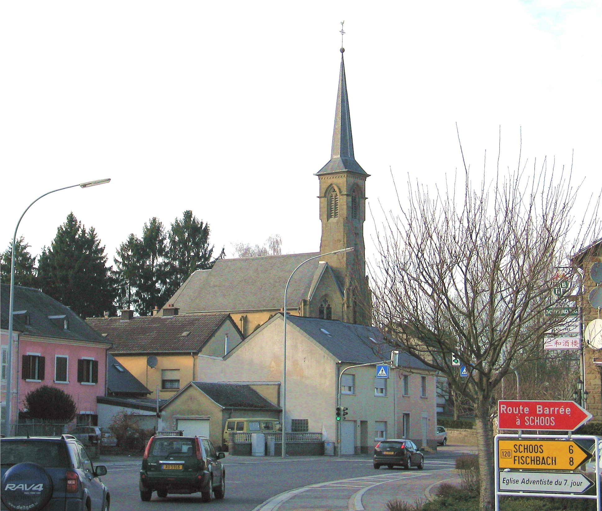 Rollengen